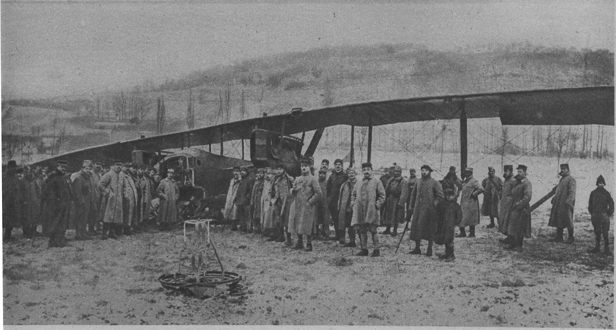 pendant la nuit du 22 au 23 décembre 1917, cet avion a été abatu prés de Soissons, les trois membres d'équipage ont été capturés.